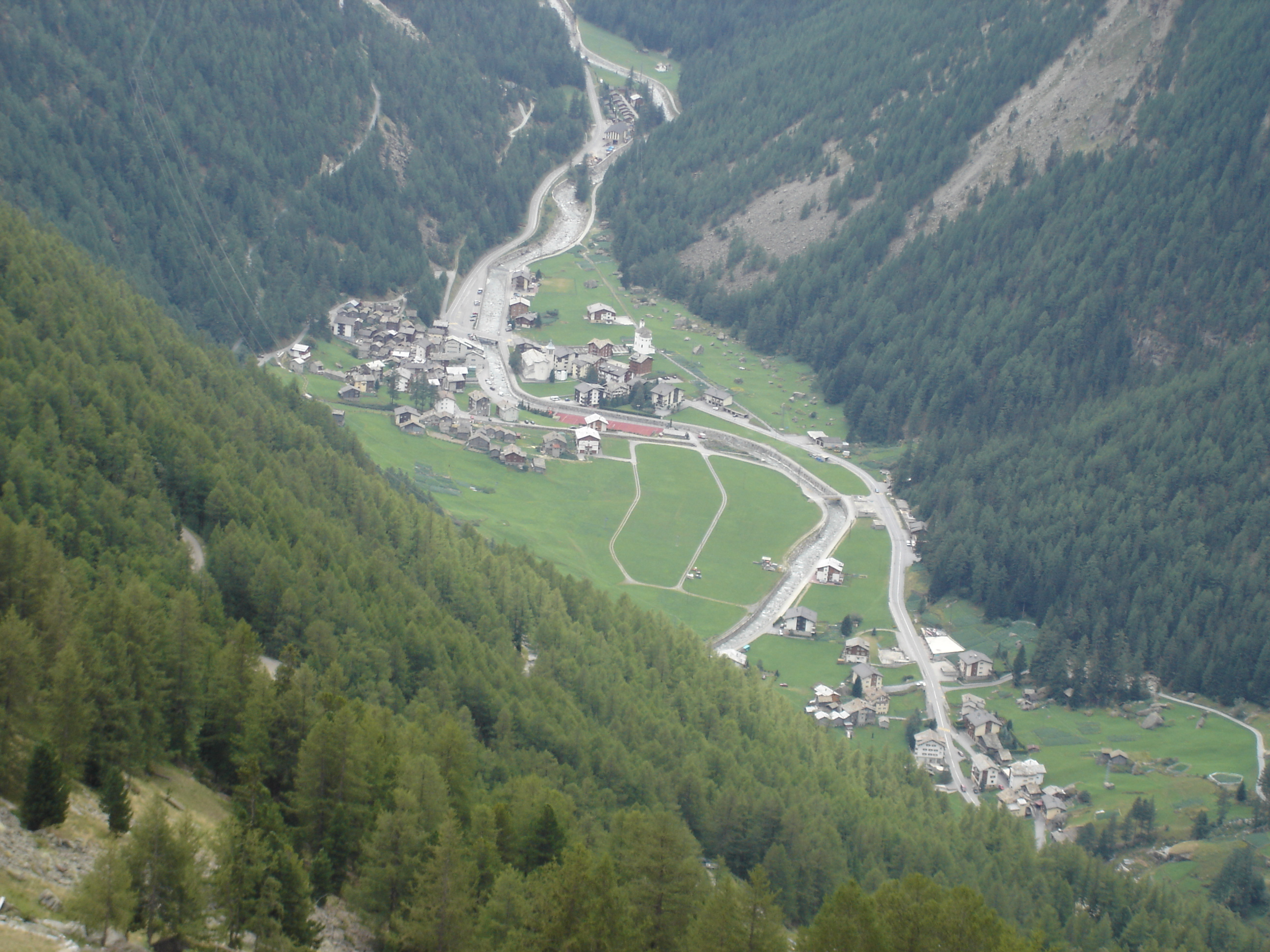 Saas Balen im Wallis